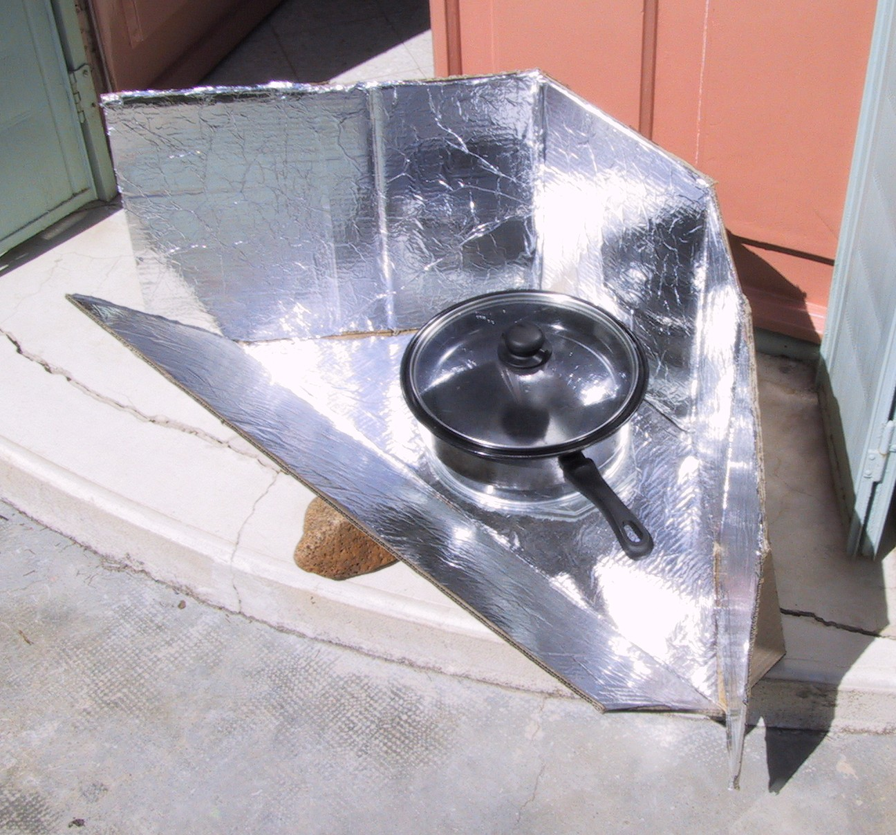 Four solaire ou cuiseur solaire en carton recouvert de papier aluminium. Source: photo prise par moi-même. Auteur: Cédric Filhol